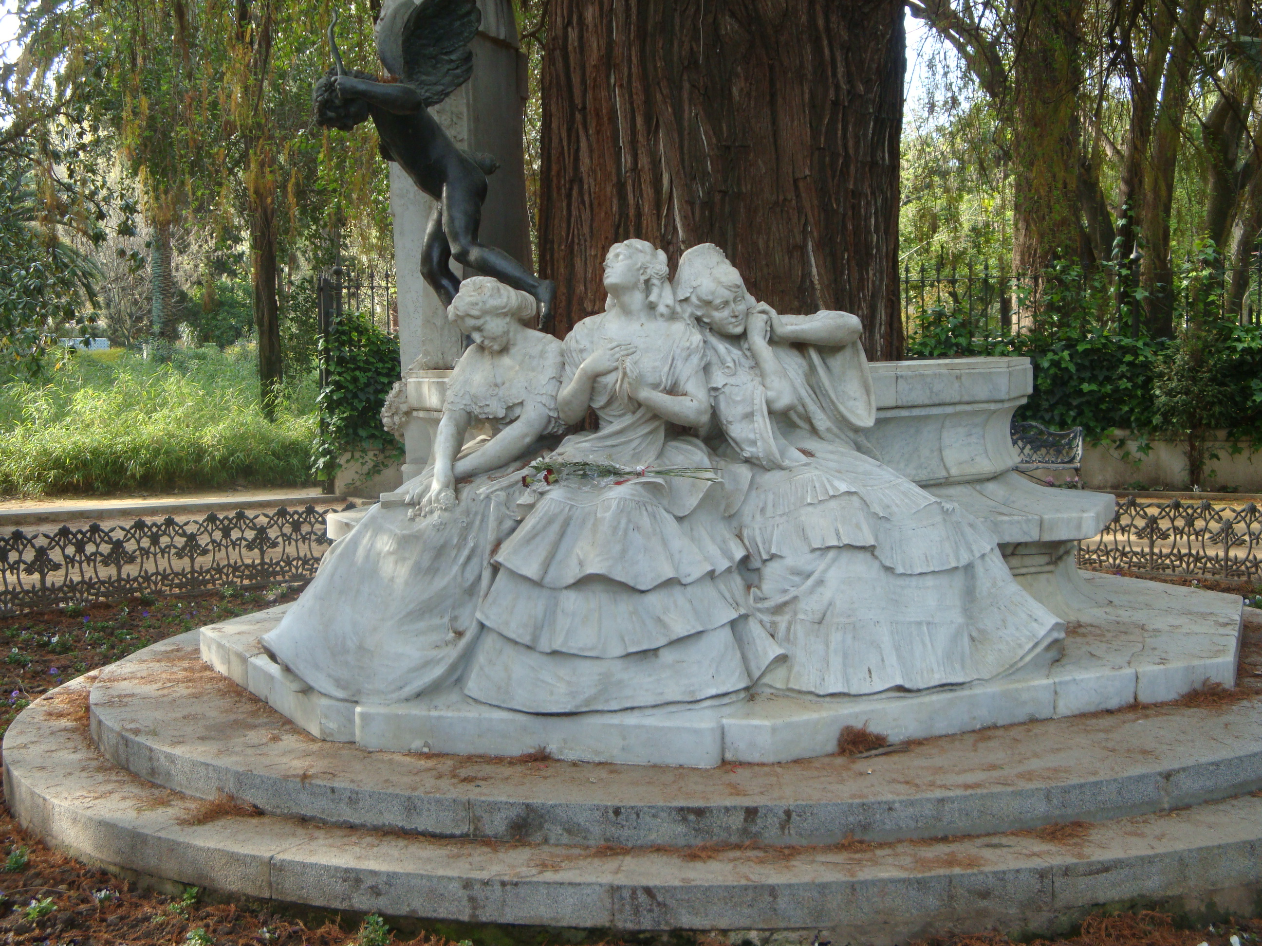 Glorieta de Bécquer. Parque María Luisa. Sevilla